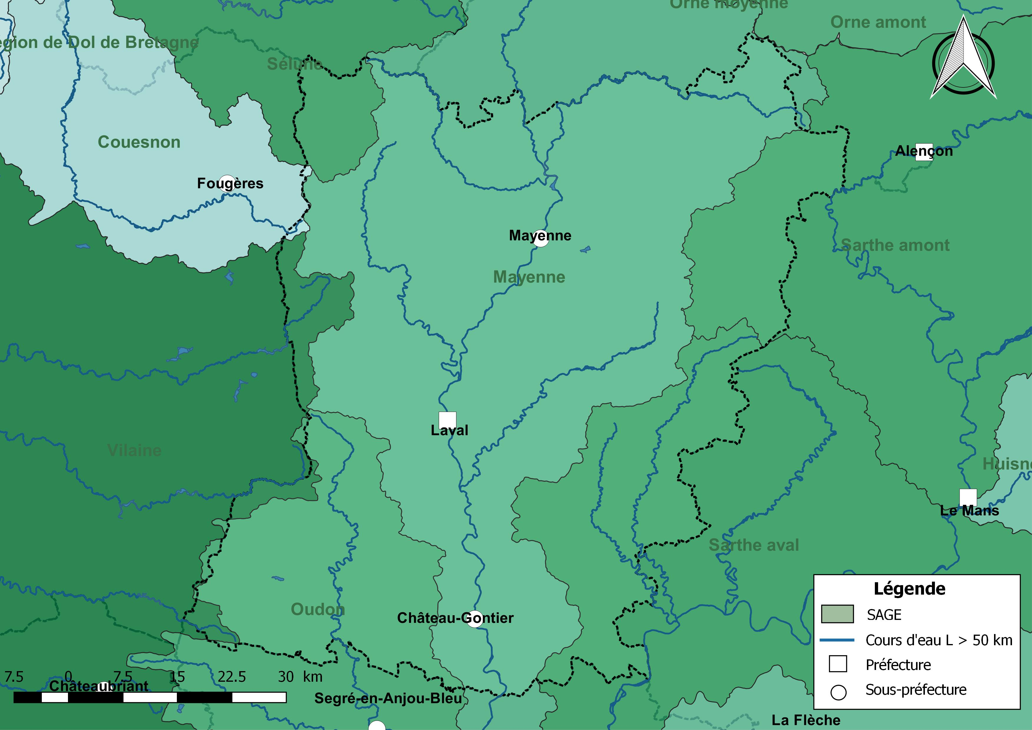 Carte des schémas d'aménagement et de gestion des eaux (SAGE) concernant le département de la Mayenne (France) au 1er janvier 2018.